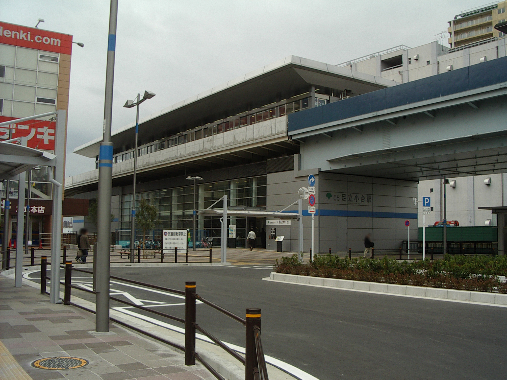 日暮里・舎人ライナー足立小台駅